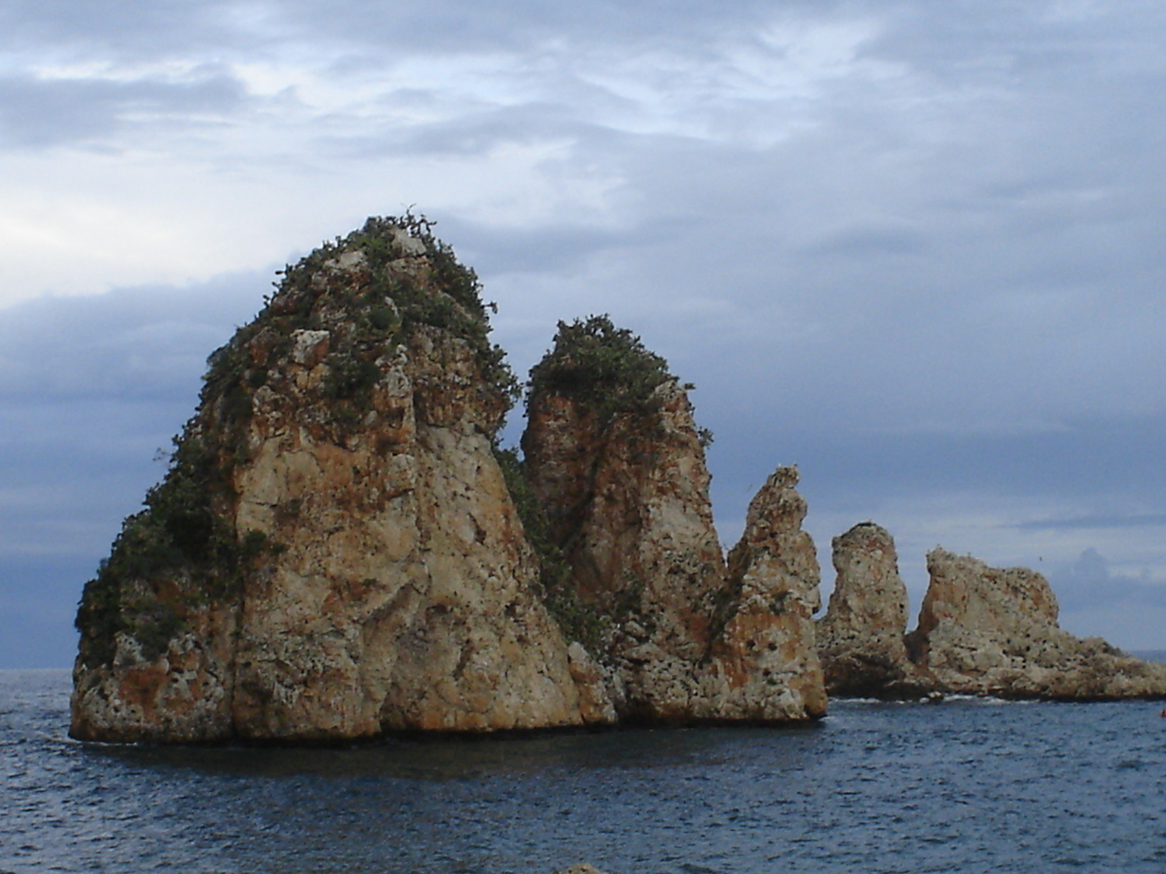 Scopello (Castellammare del Golfo), faraglioni